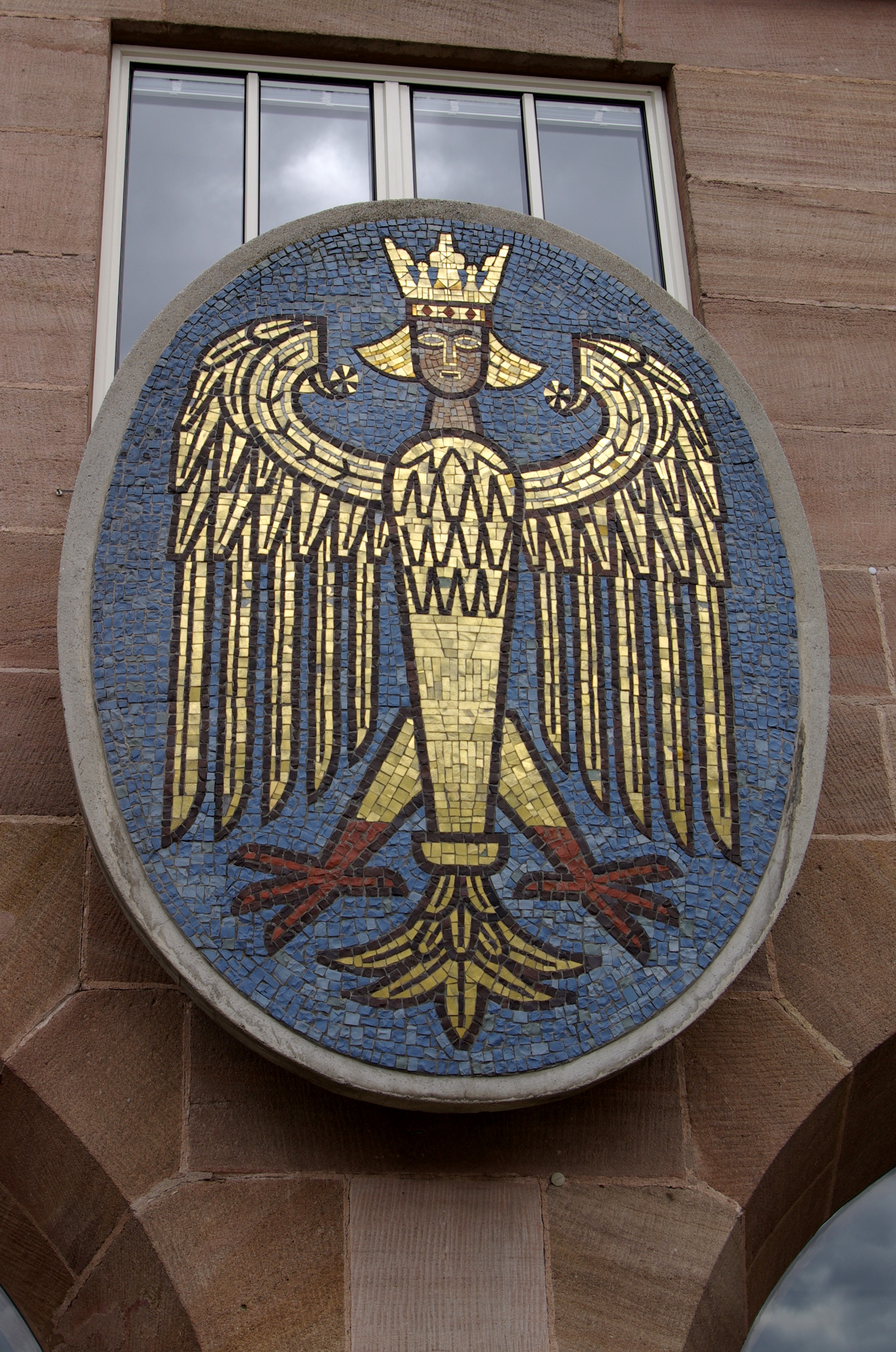 Großes Wappen der Stadt Nürnberg am Neuen Rathaus am Hauptmarkt.